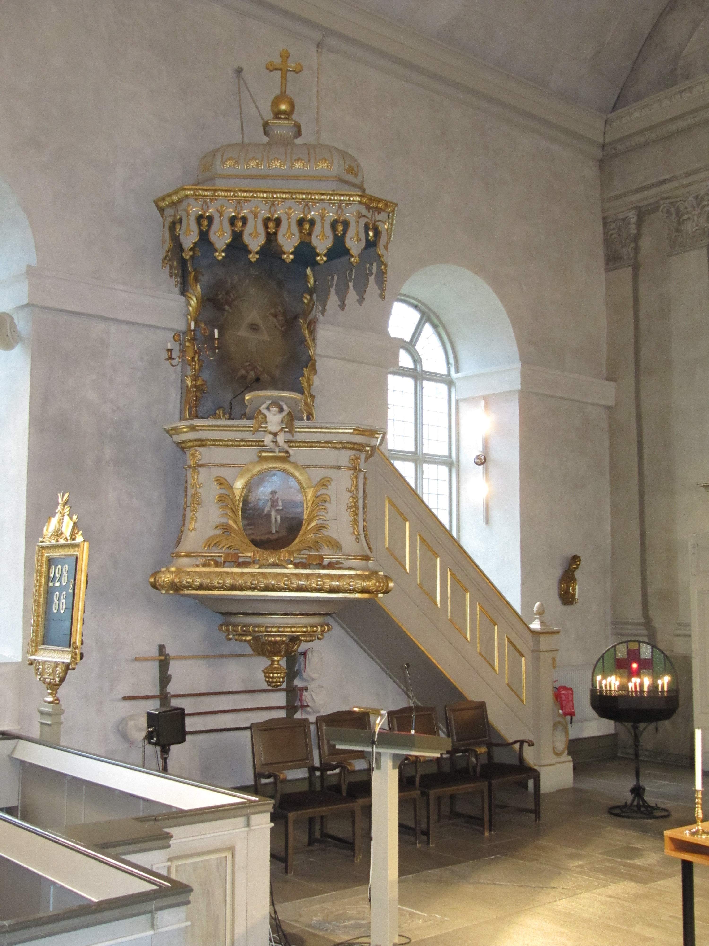 Predikstol i Timrå kyrka